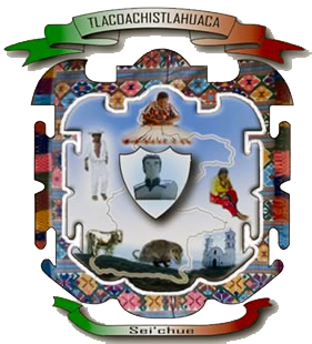 Escudo del municipio de Tlacoachistlahuaca, Gro.